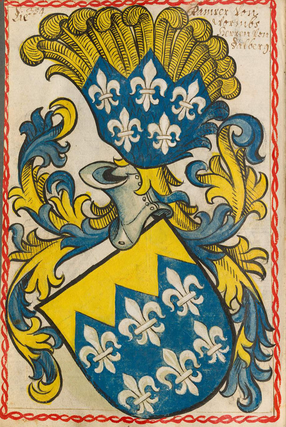 Scheibler'sches Wappenbuch , älterer Teil Dalberg Kämmerer von Worms